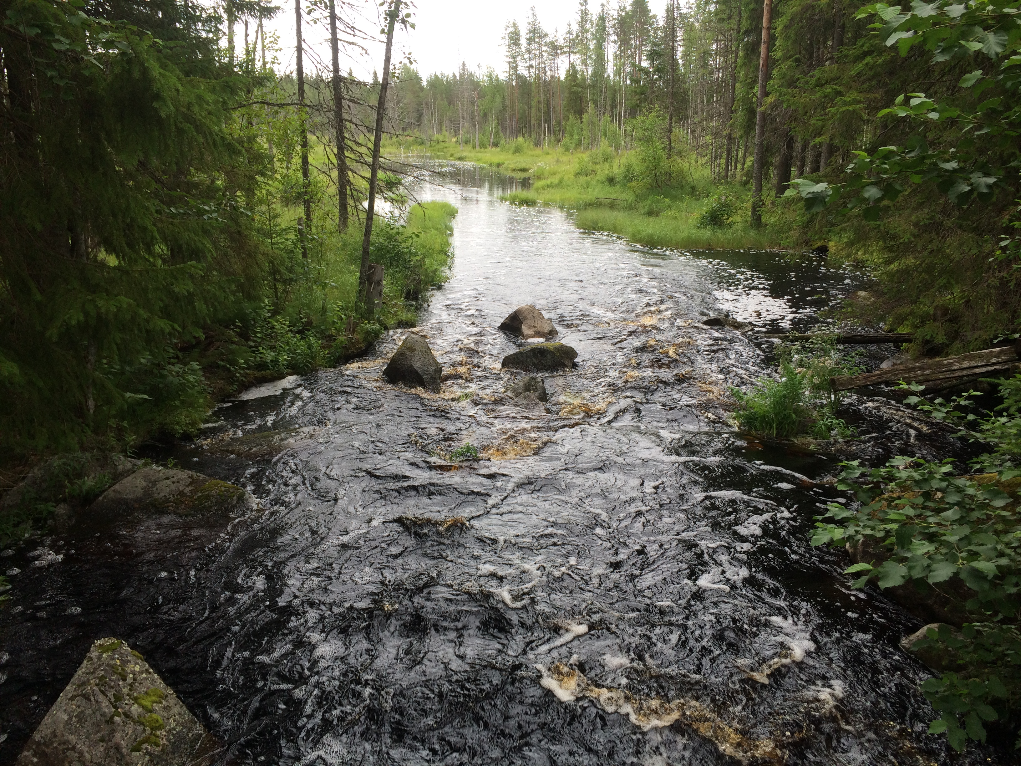 Пейтанйоки